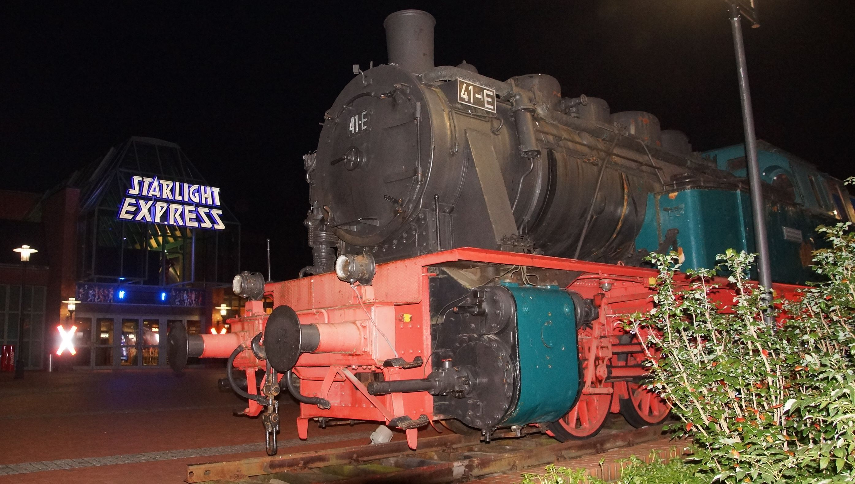 Lokomotive Hibernia 41E aus dem Eisenbahnmuseum Dahlhausen vor dem Starlight Express Theater, Stadionring 24 in Bochum